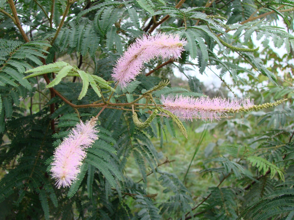 Mimosa verrucosa Benth. - FABACEAE - BR 242 - Cristópolis - Bahia - Brasil.